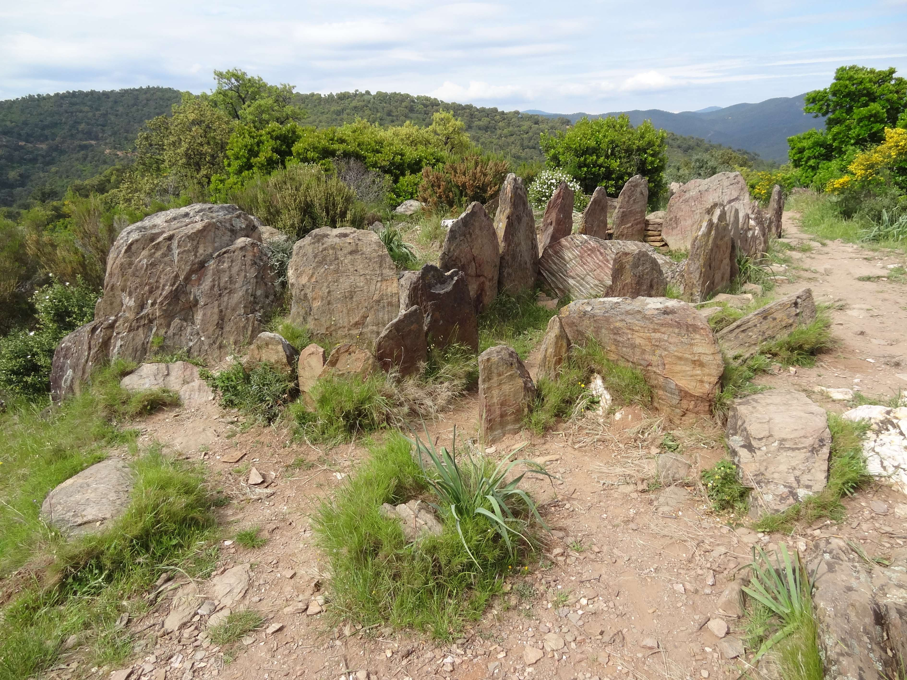 Dolmen de Gaoutabry (Inscrit) .